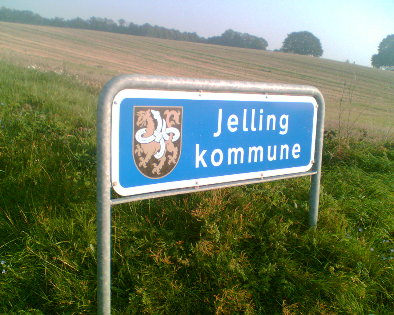 Foto af det gamle kommuneskilt til forhenværende Jelling Kommune